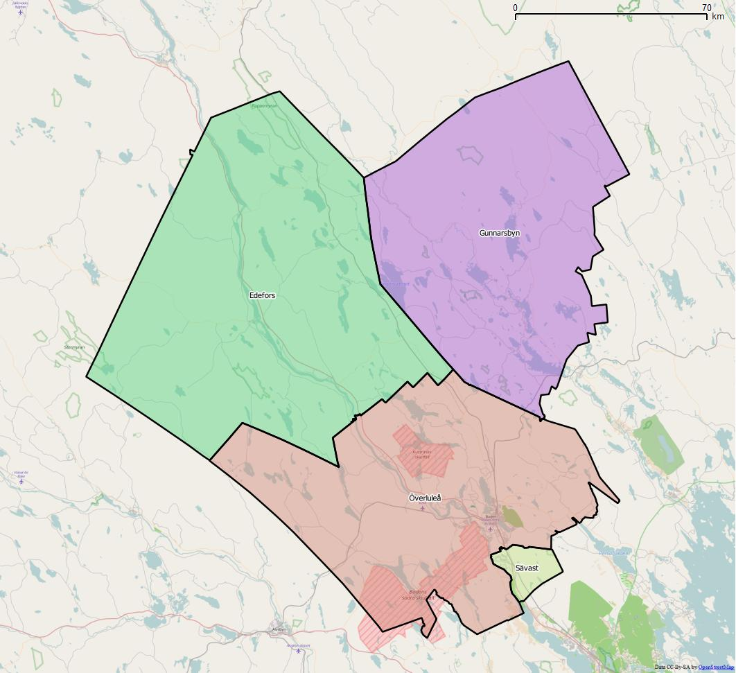 Distriktsindelningen i Bodens kommun